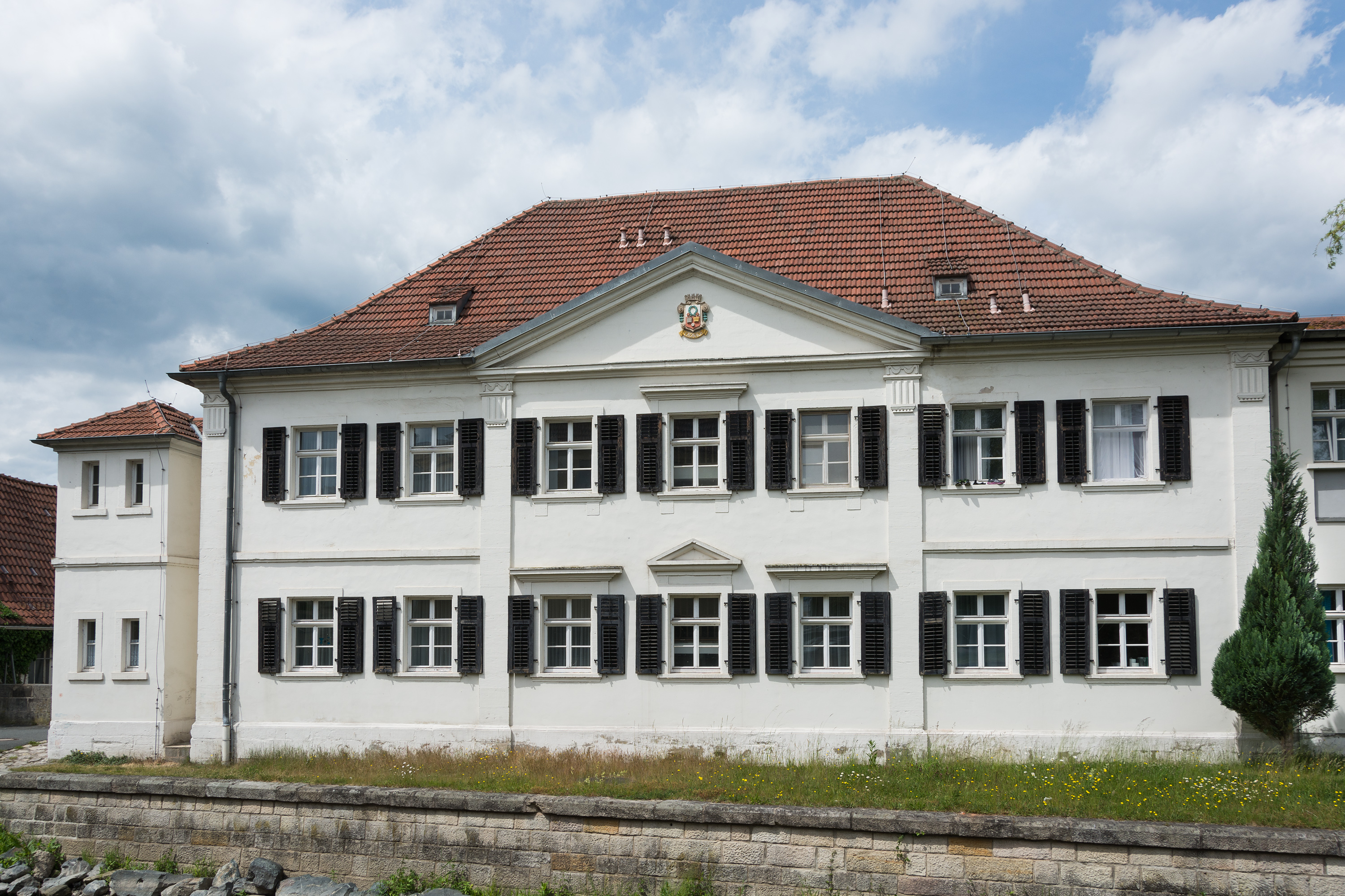 Nebengebäude des ehemaligen Bürgerspitals in Kronach. Das Bauwerk wurde 1821 freistehend errichtet und 1957 mit dem ursprünglichen Spitalgebäude verbunden.